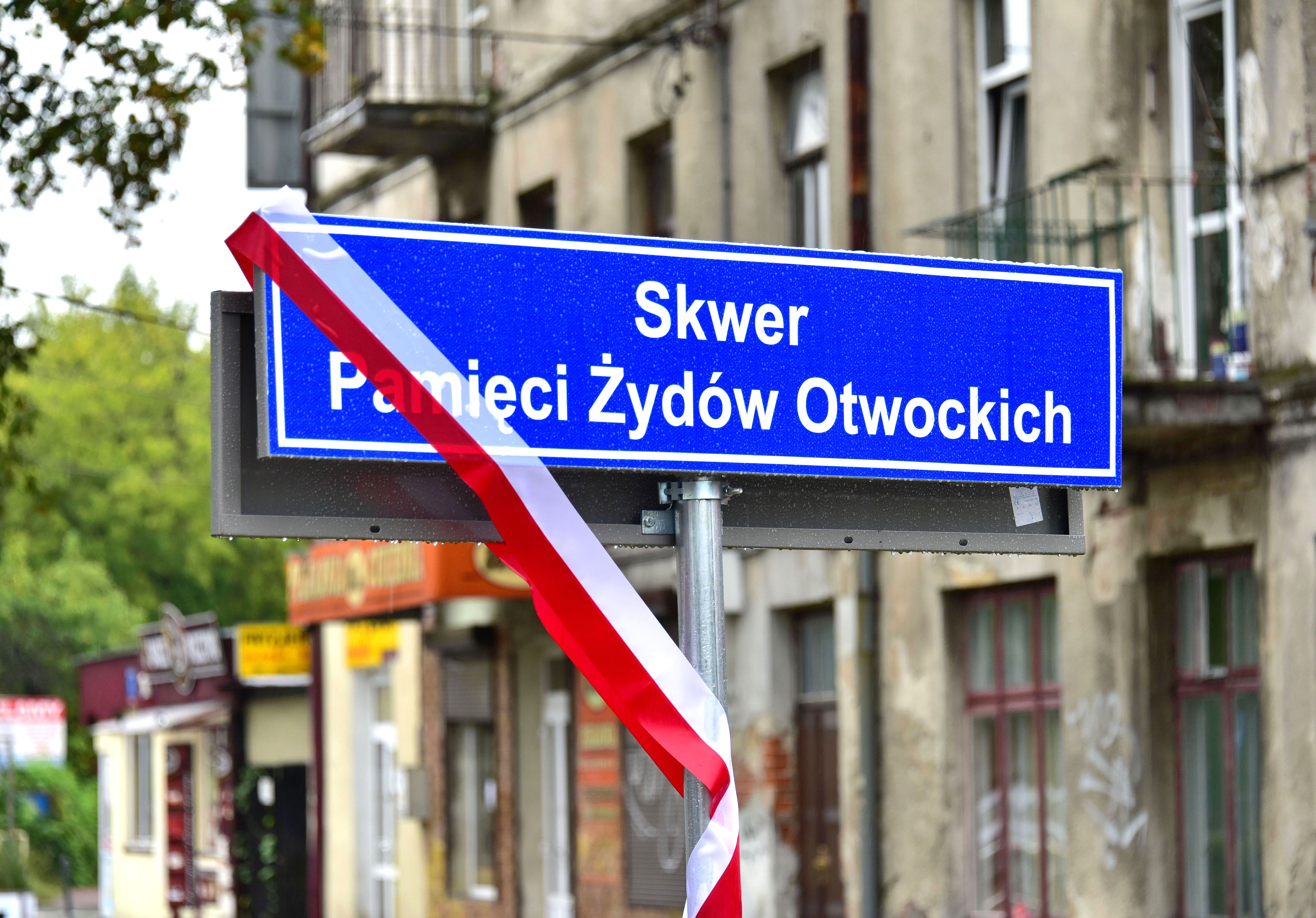 Tablica informacyjna na skwerze Pamięci Żydów Otwockich w Otwocku